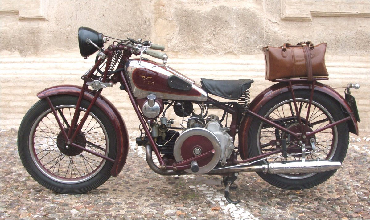 Moto Guzzi Sport 15 del 1931 fotografato al Raduno Moto Storiche di Medole nel 2007